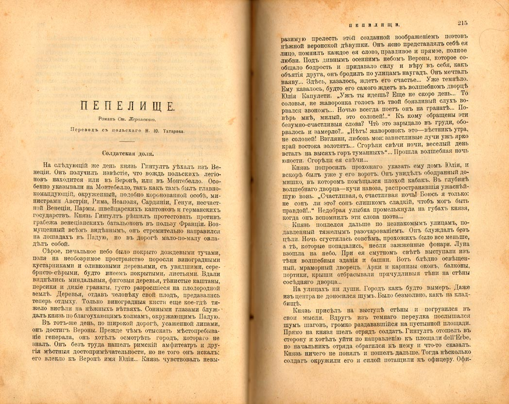 "Пепелище", роман Стефана Жеромского, перевод Н. Ю. Татарова